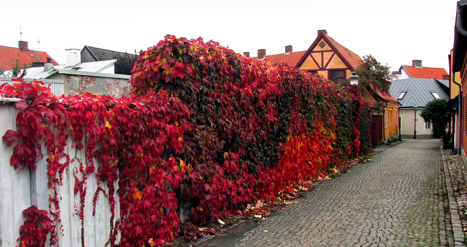 Klättervildvin (Parthenocissus tricuspidata) längs en mur på Supgränd i Ystad. 18 okt 2015.